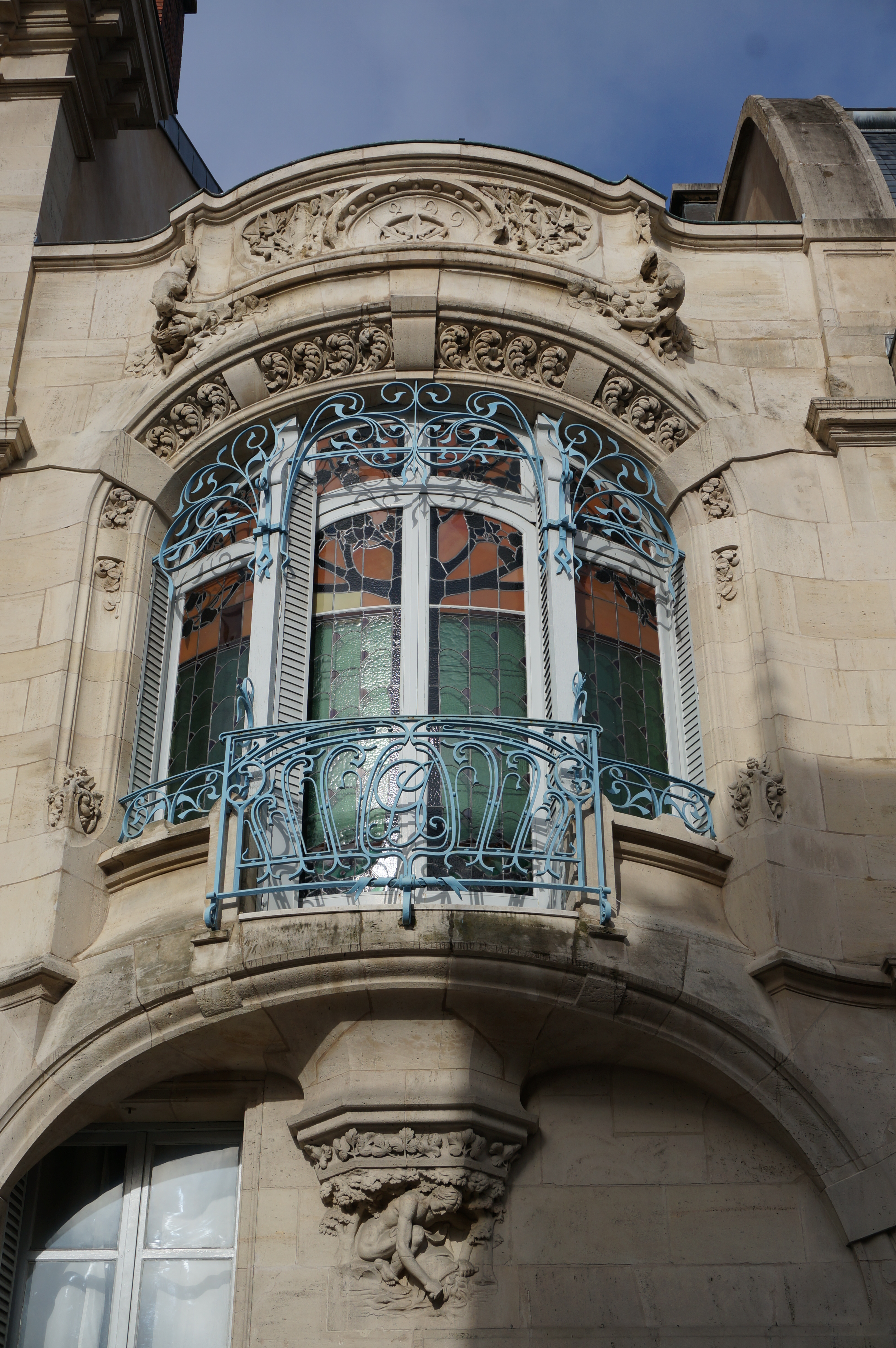 Maison Gaudin, 97 rue Charles III, Monument historique de Nancy.